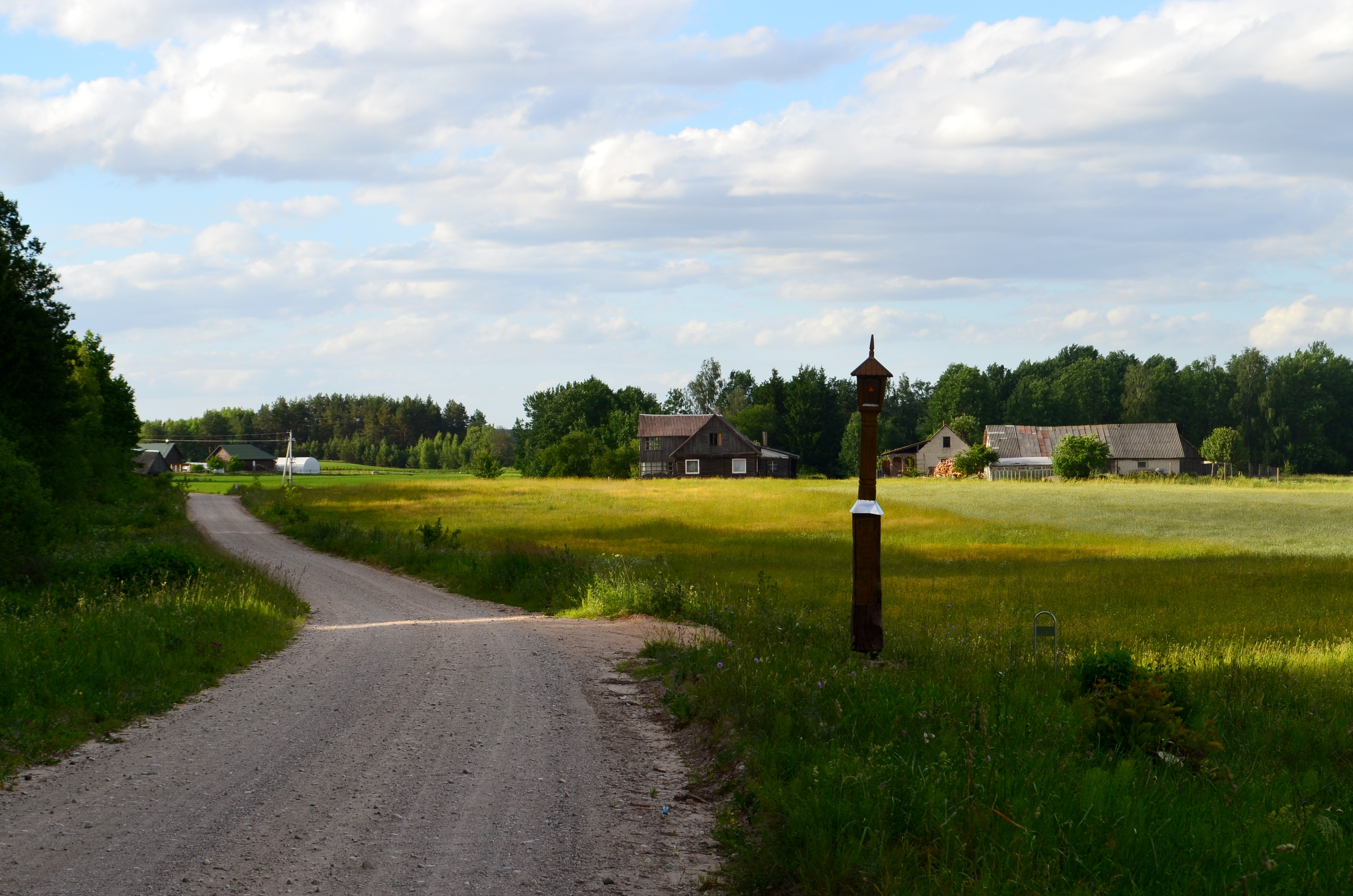 Įvažiavimas Nedzingėn iš pietų, Varėnos raj.